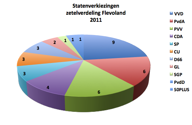 Uitslag provinciale statenverkiezingen Flevoland vertaald in zetels